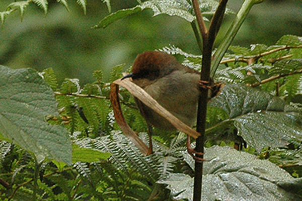 Uganda Chubb's Cisticola (Cisticola chubbi) Ruhija, SW. Uganda